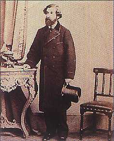 Antonio María Pradilla